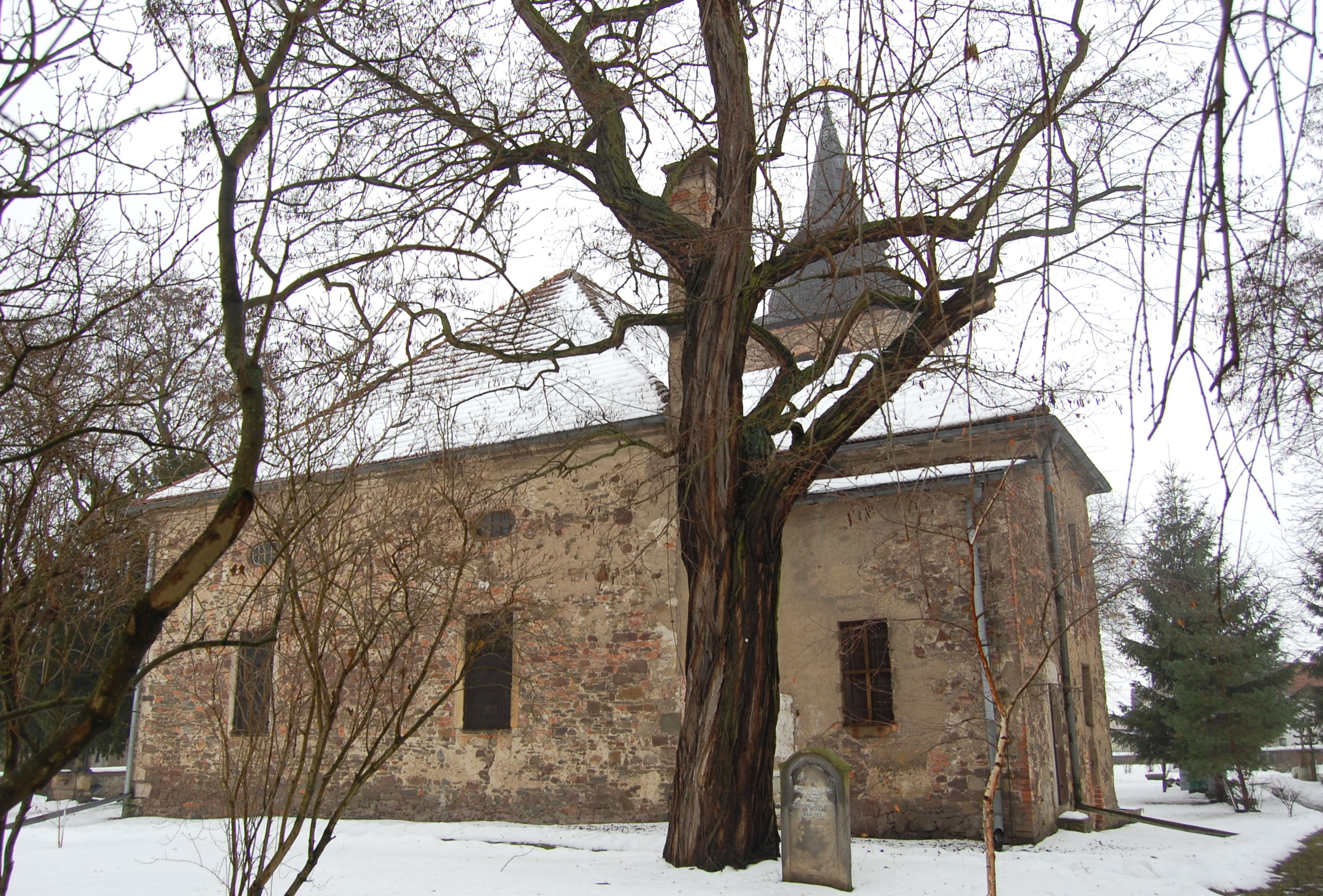 Rückseite der Sankt-Peter-und-Paul-Kirche in Barleben